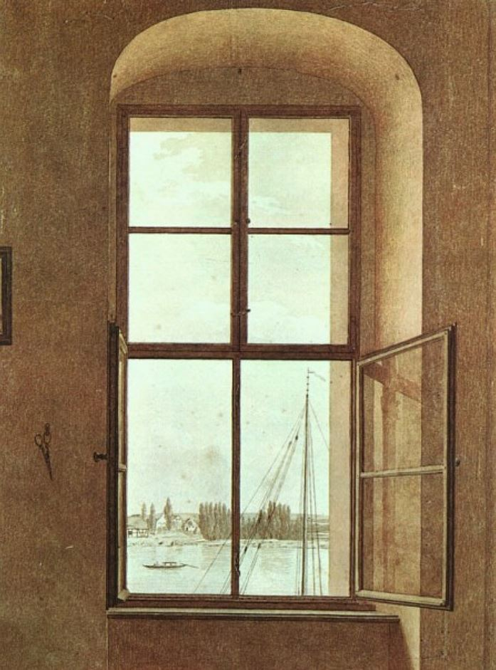 Blick aus dem Fenster des Künstlers, rechtes Fenster